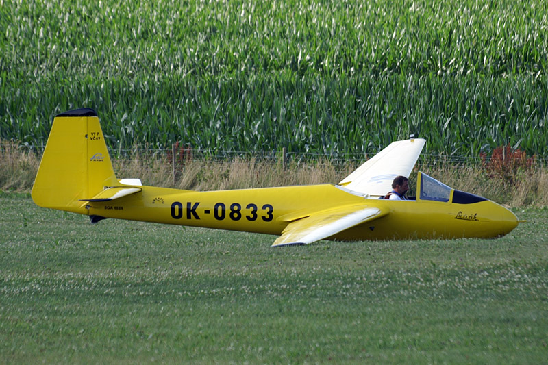 LF-107 Luňák OK-0833